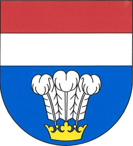 Spomyšl znak